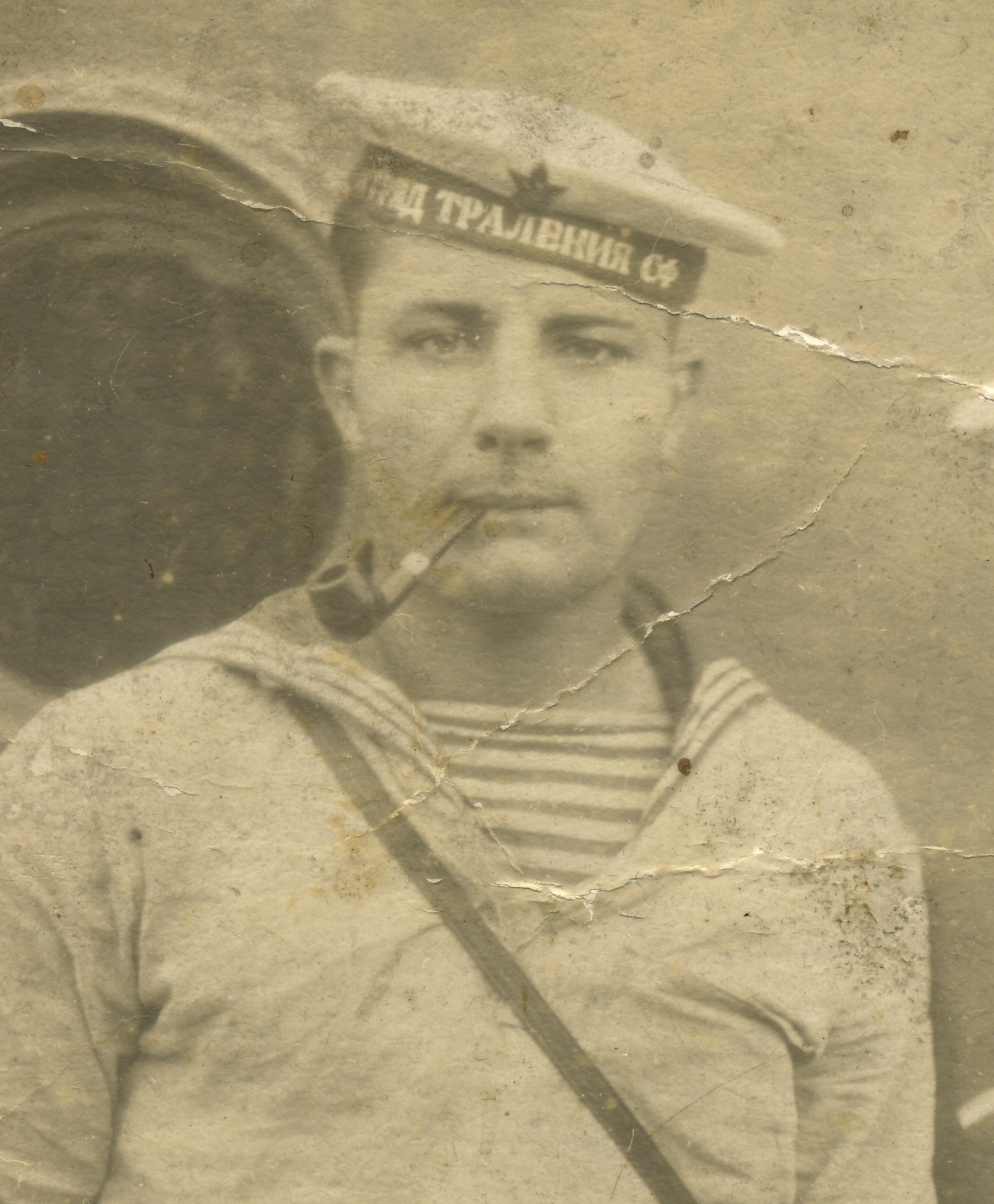 1940 Sevrnuy Flot storogevoi korabl "Smerch"